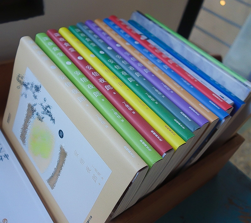 深夜食堂（中国語版） 安倍夜郎 著 丁世佳 訳 新経典文化 （2013年5月、台湾・台南市にて、装丁は加工済）